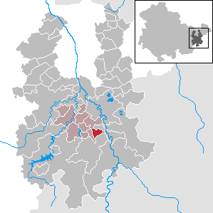 Neugernsdorf in Thuringia - District Greiz